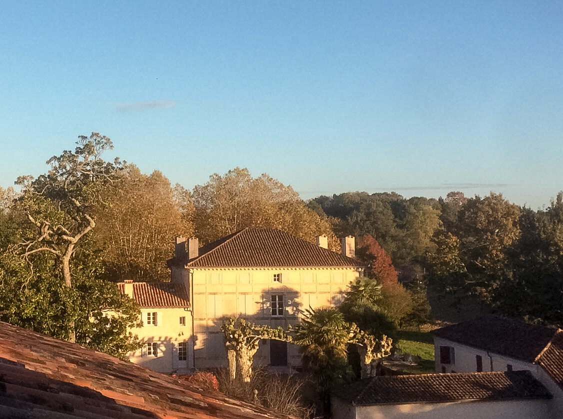 Juzanx